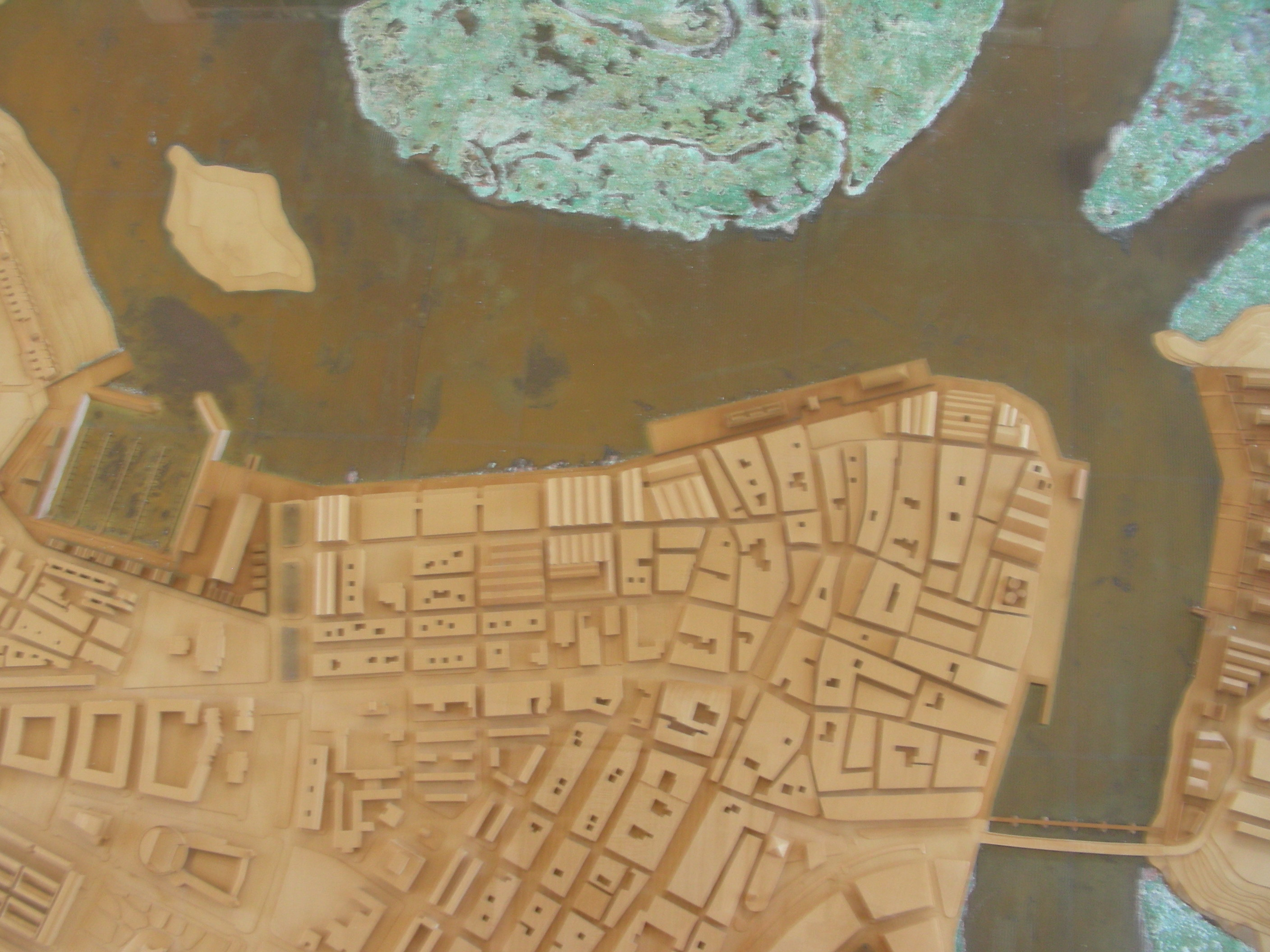 Vista superior de una maqueta del puerto industrial y deportivo de Isla Cristina